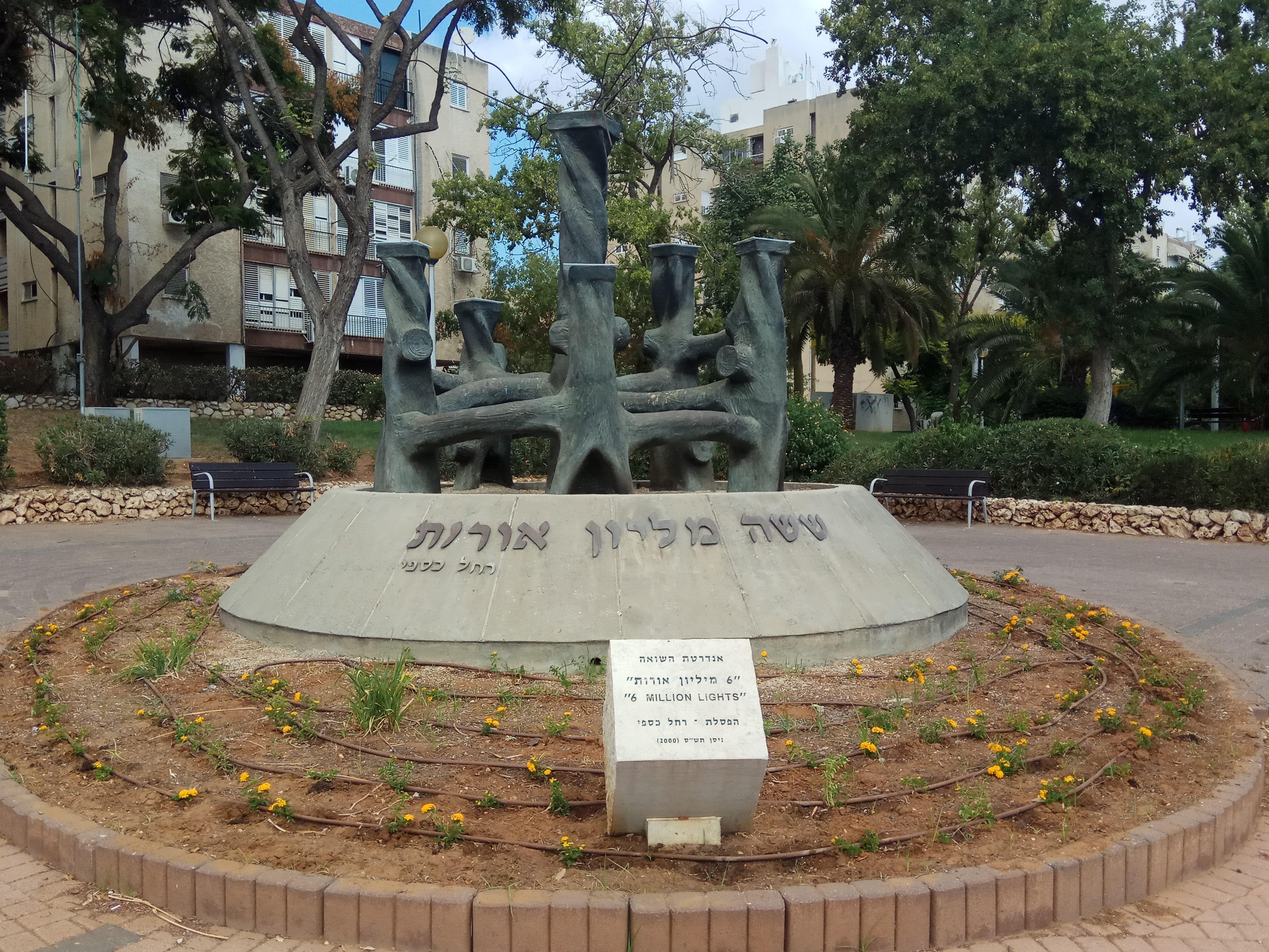 אנדרטת ששה מיליון אורות בחולון